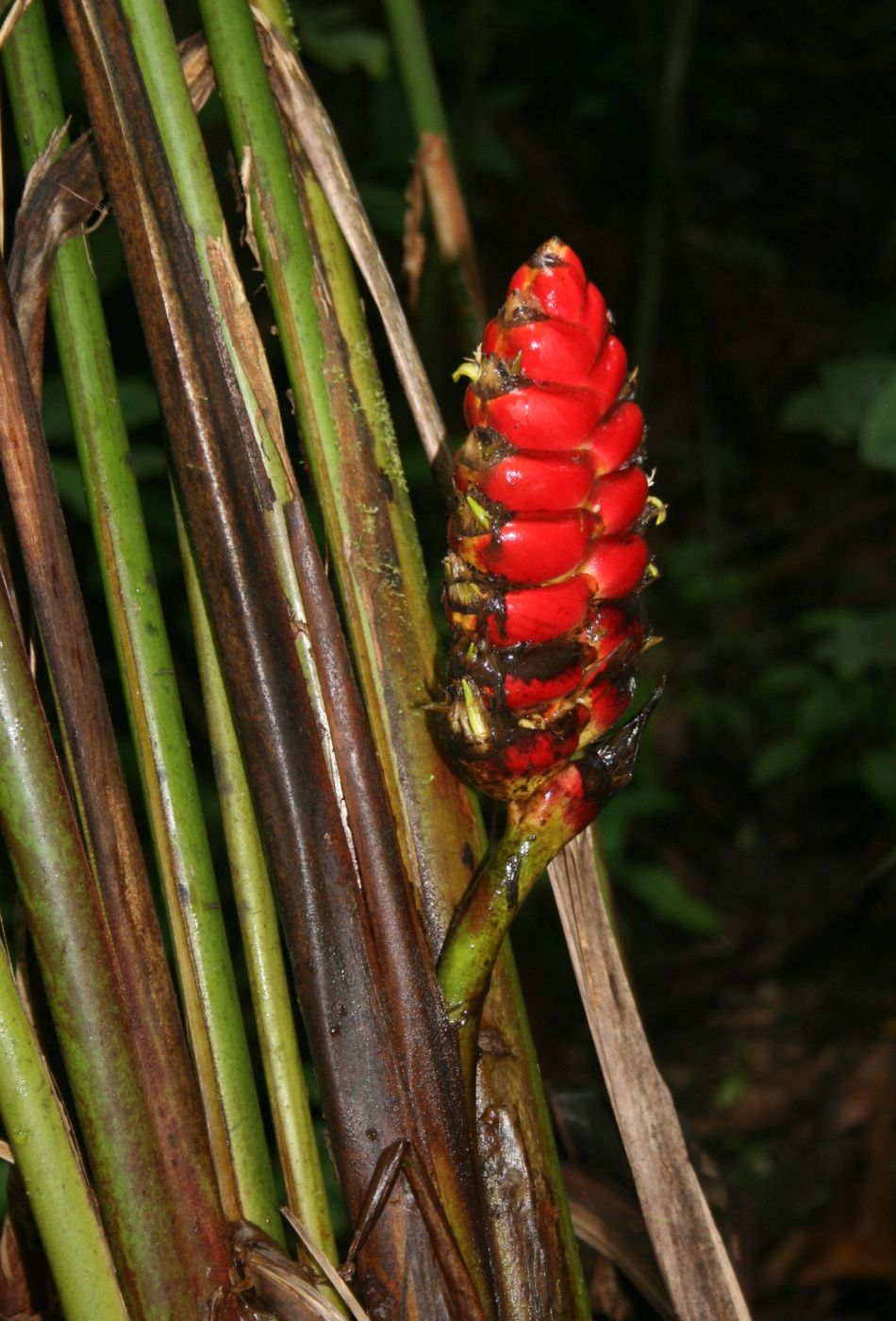 Heliconia imbricata, Heliconiaceae - Costa Rica: Prov. Puntarenas, La Gamba NW Golfito, "Riverbed Trail" zwischen "Tropenstation La Gamba"/"Estación Biológica La Gamba" und "Esquinas Rainforest Lodge"